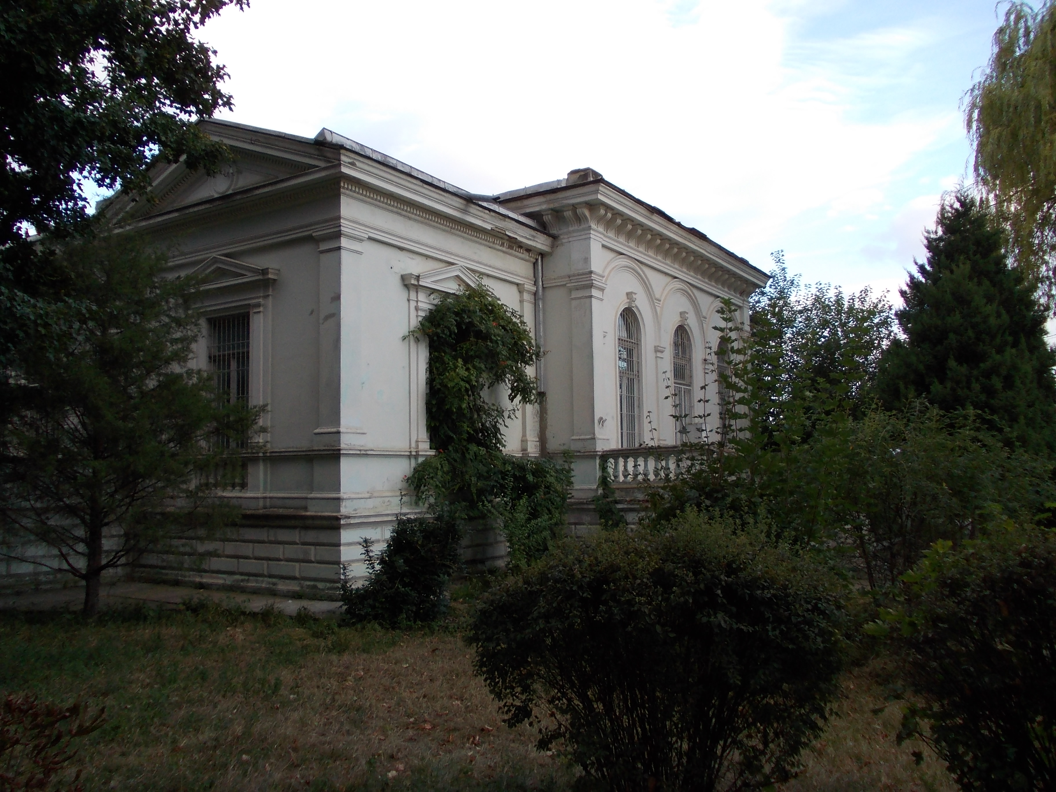 Casa Costache Morțun, azi Muzeul de Științe Naturale